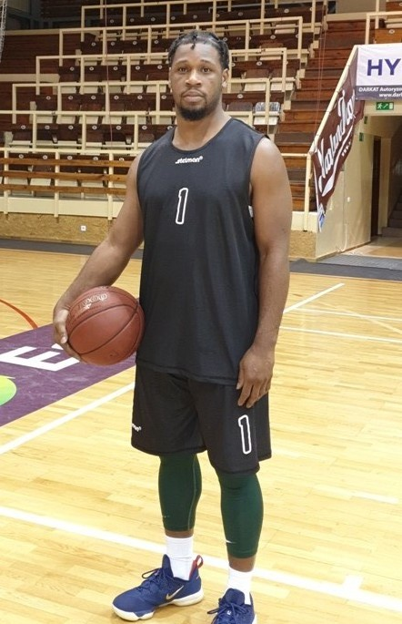 Spójnia Demond Carter